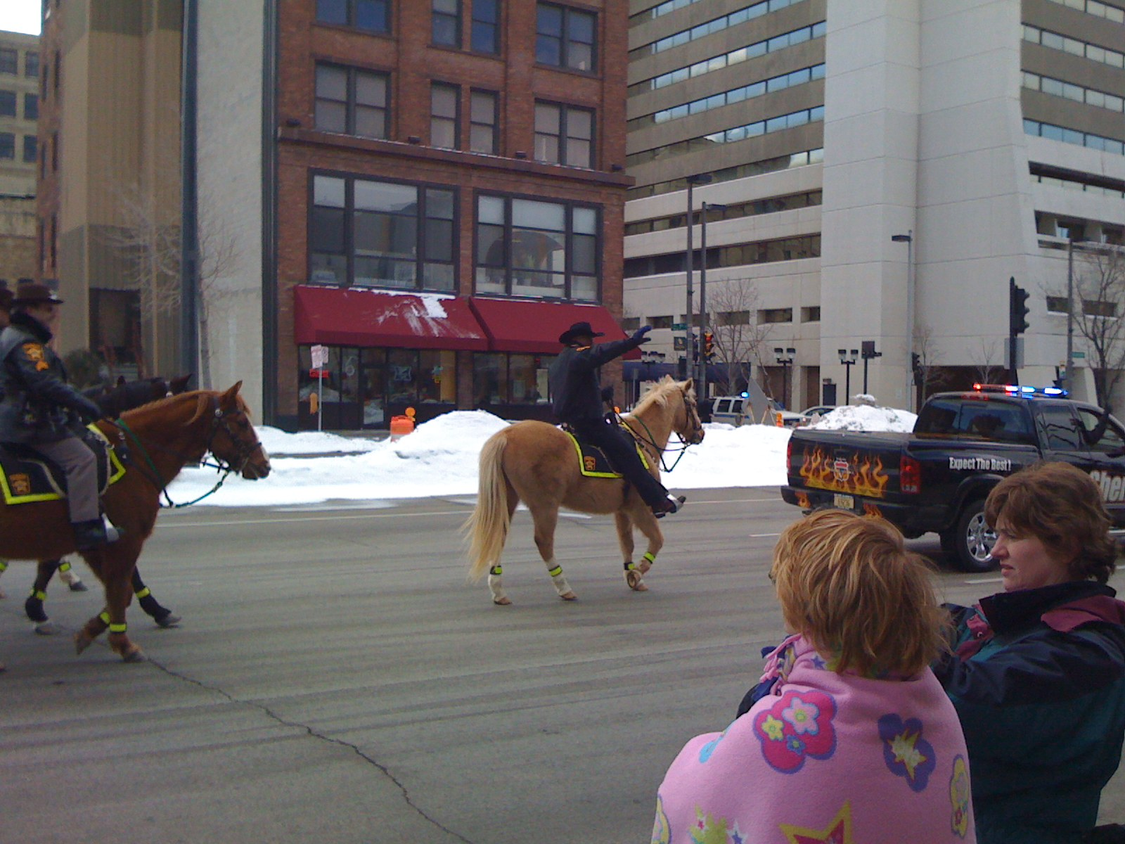 Great man!